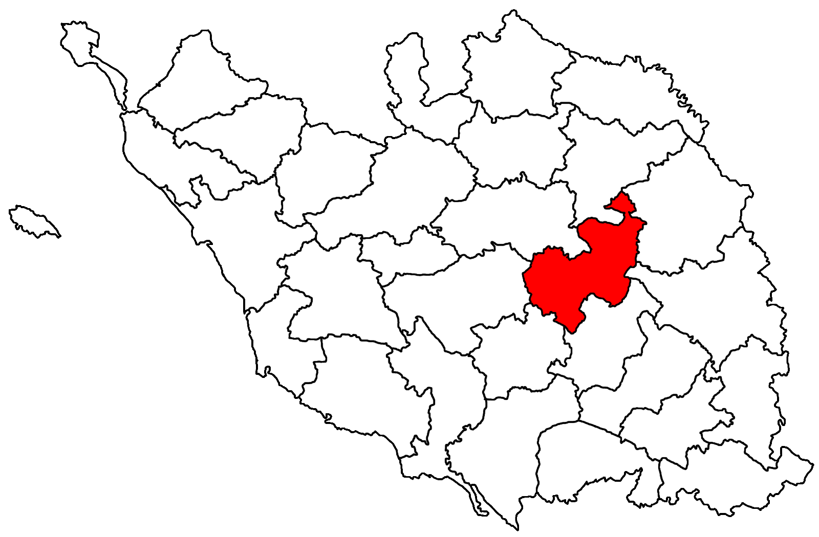 Le canton de Chantonnay dans le découpage cantonal vendéen de 1973.